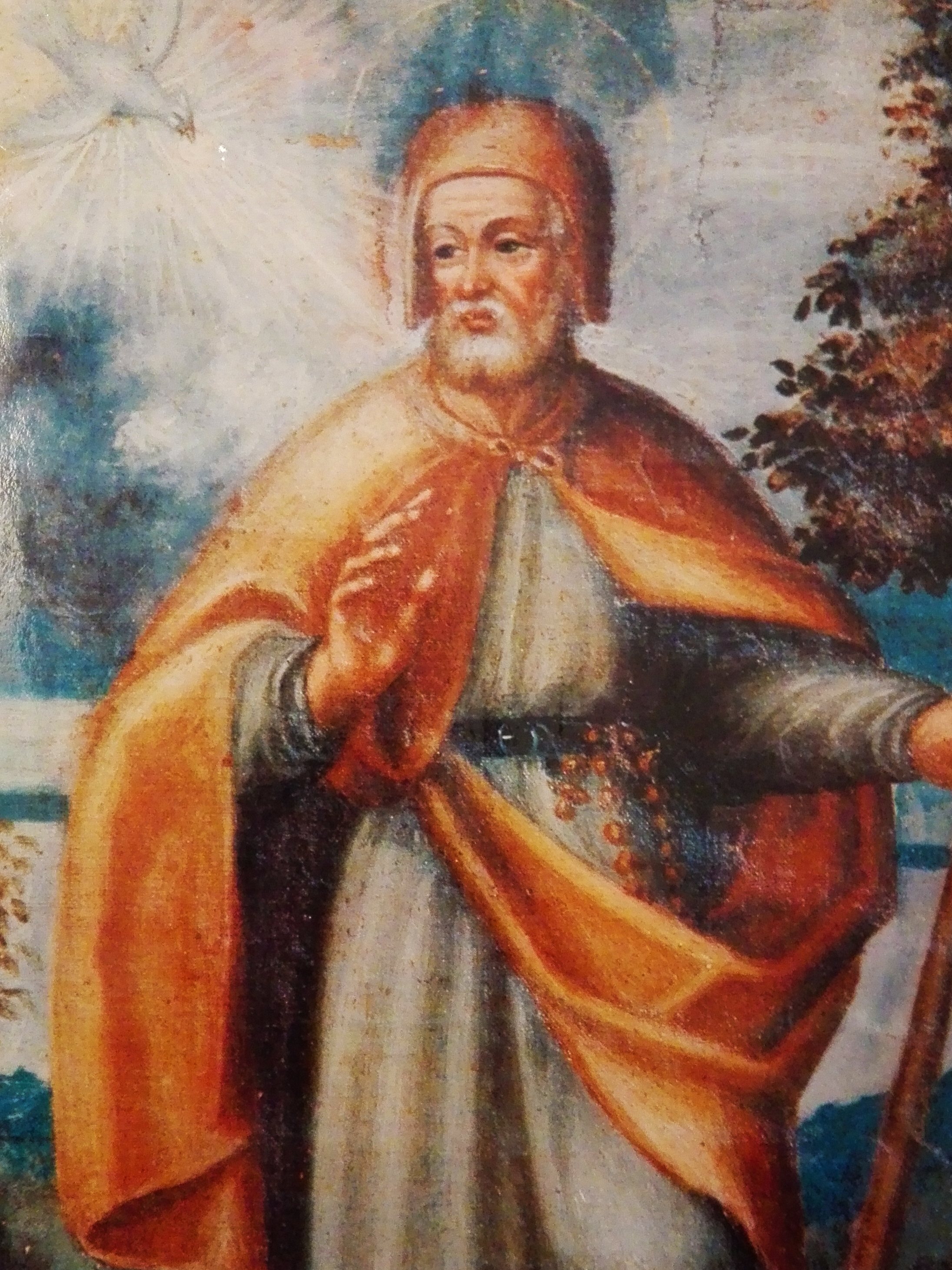 Riproduzione della più antica figura del Beato Alberto da Villa d'Ogna (autore ignoto - XVI secolo)